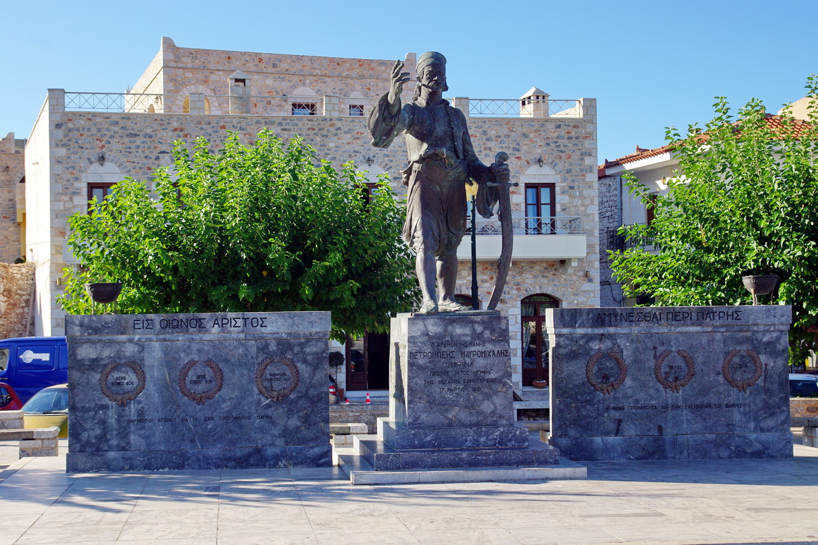 Denkmal Petros Mavromichalis, Areopoli, Itylo, Innere Mani